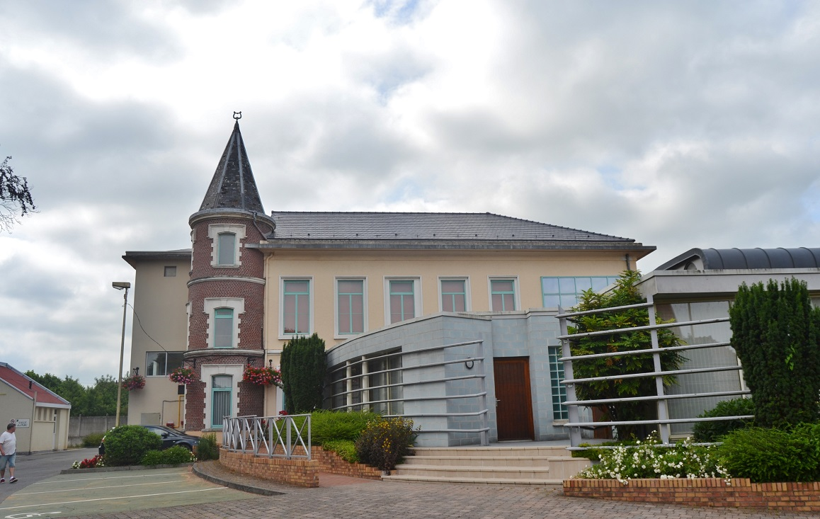 Hotel-de-Ville